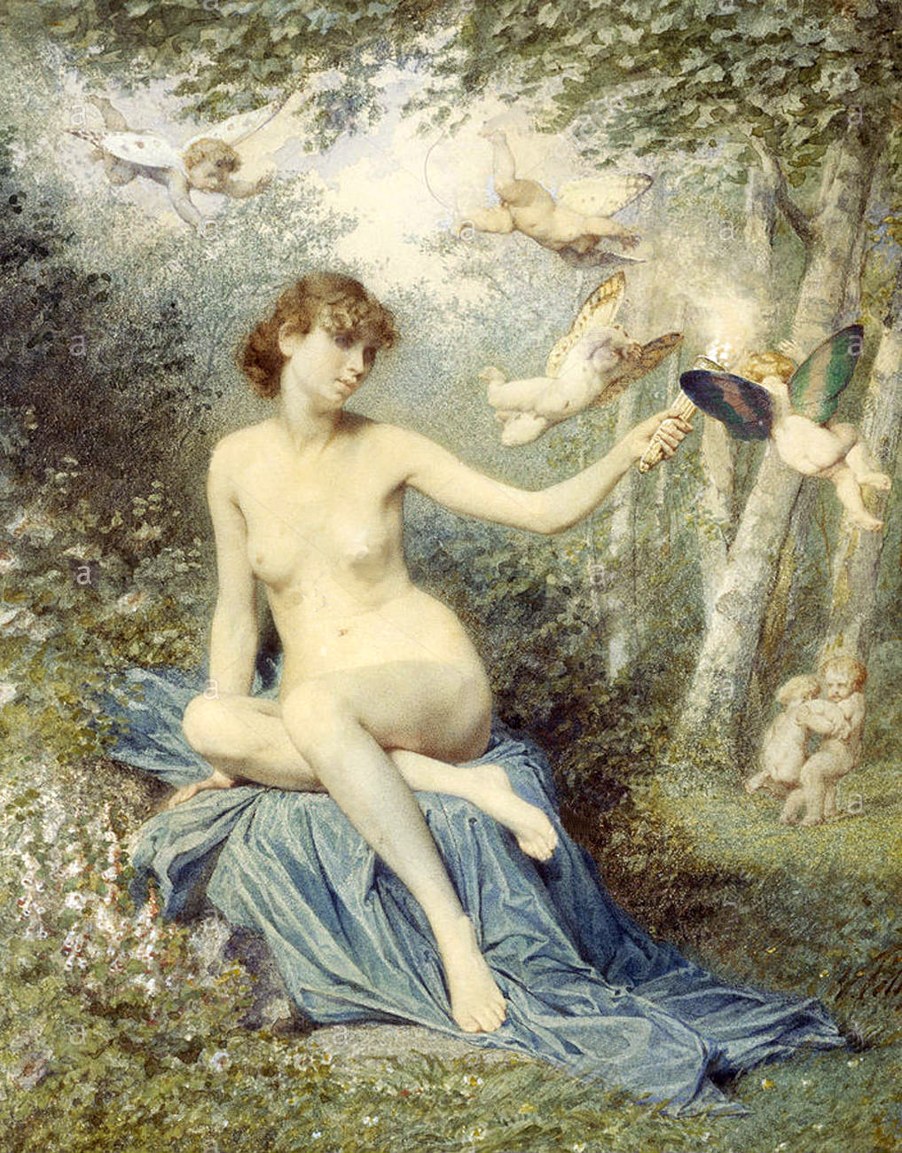 Victor-Florence Pollet (1811-1882), Nymphe repoussant l'Amour avec une torche.